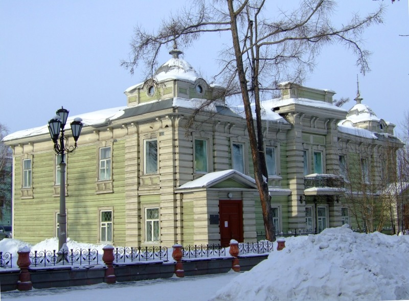 Семейный дом (особняк) В А Рассушина